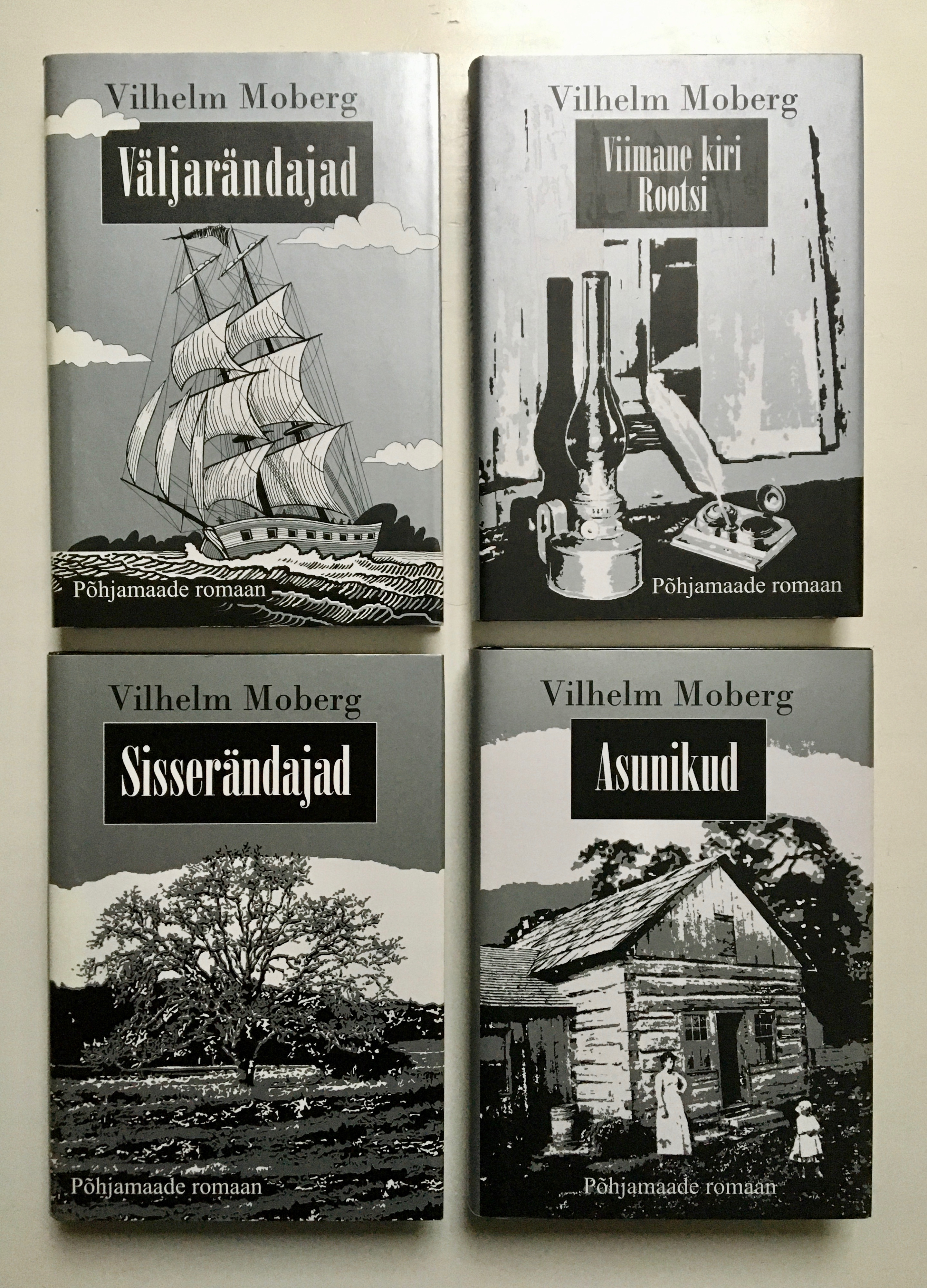 PR Moberg esikaaned